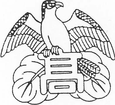 小千谷高等学校・校章